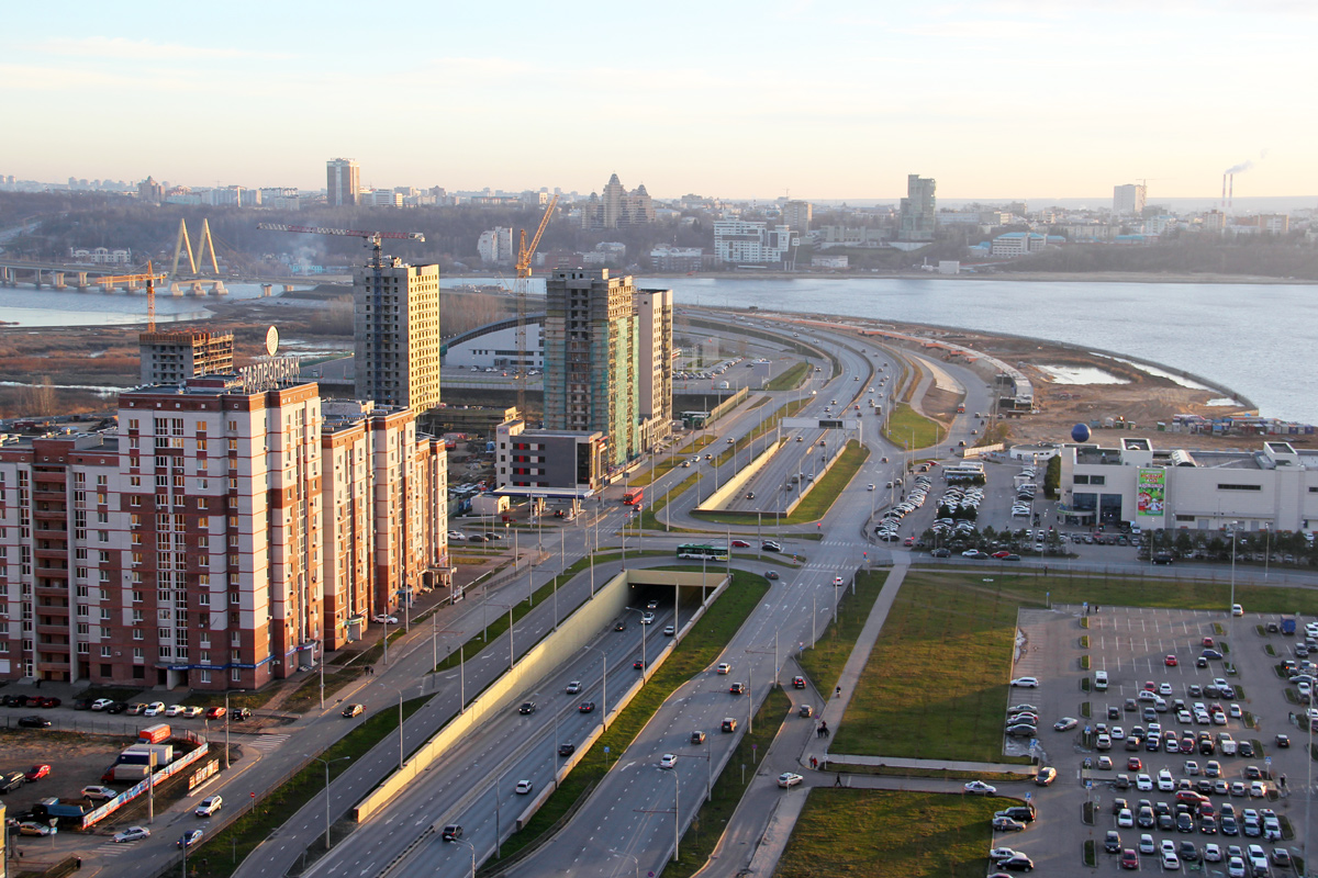 Проспект Амирхана, южная часть